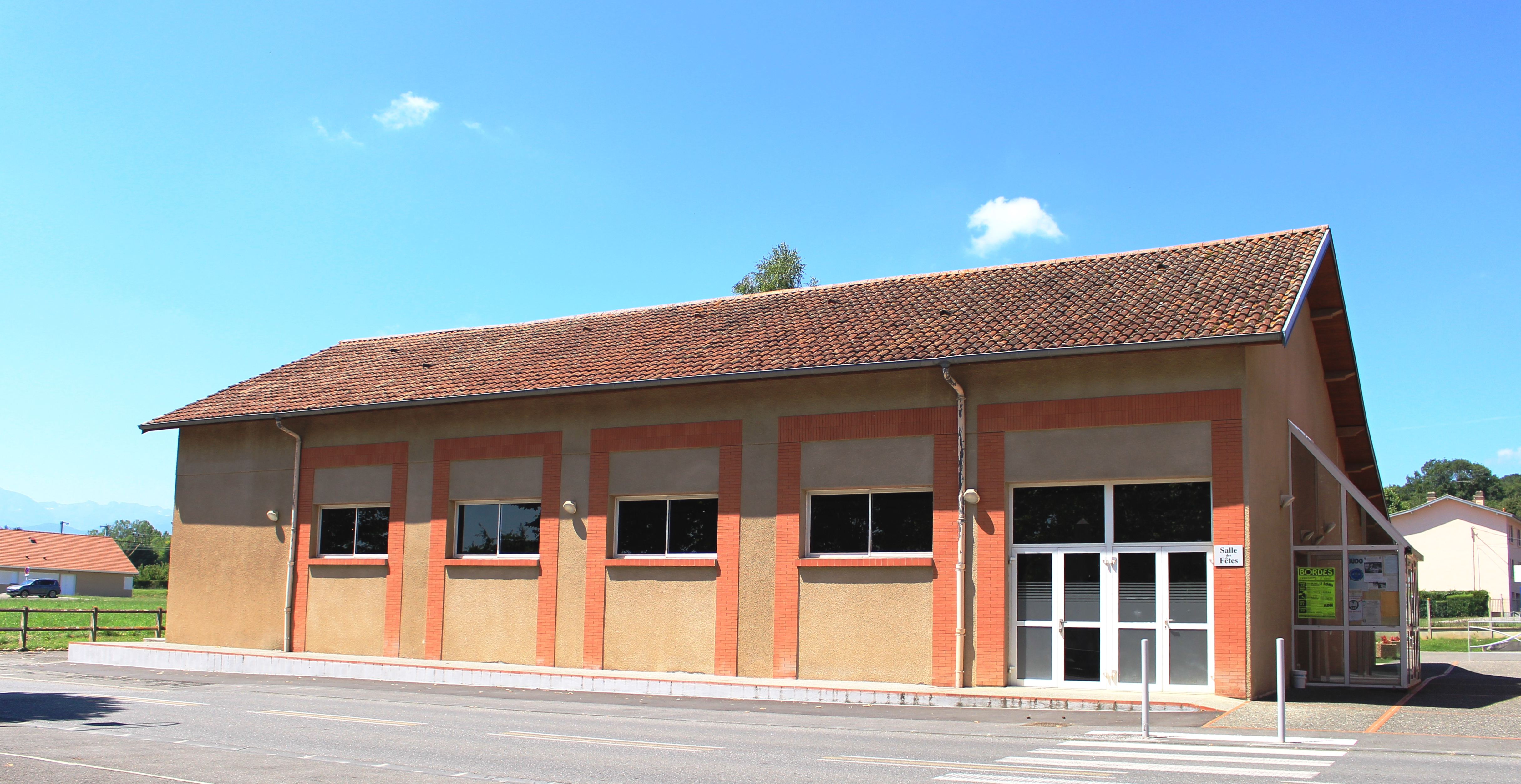 Salle des fêtes de Bordes (Hautes-Pyrénées)